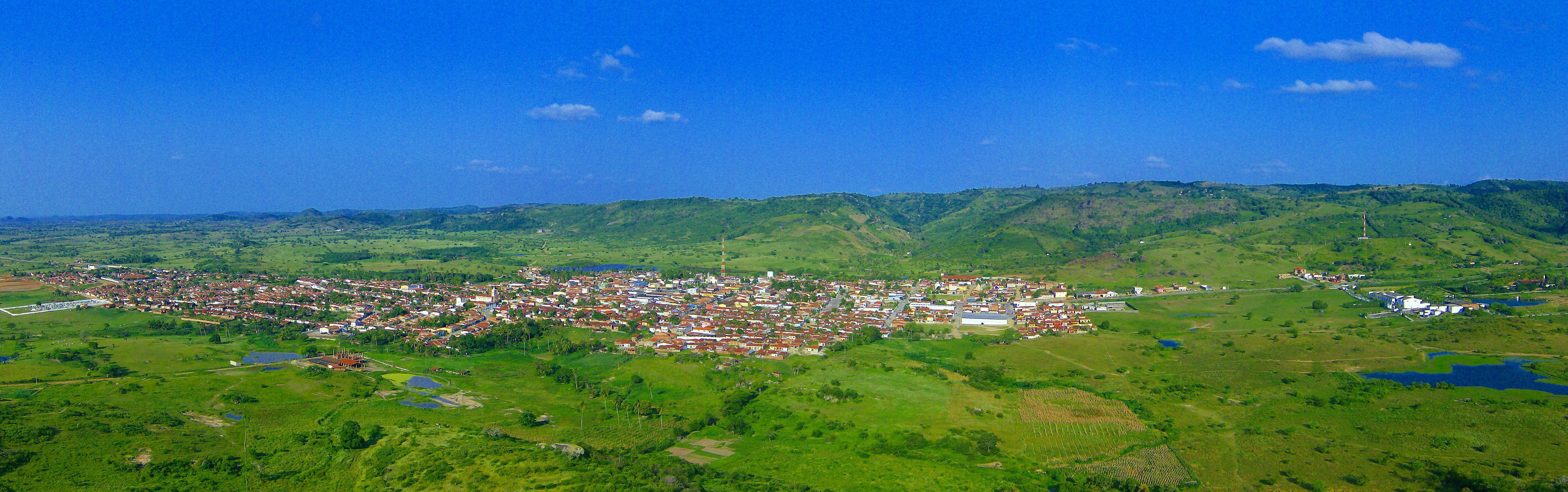 Vista panorâmica de Belém da Paraíba